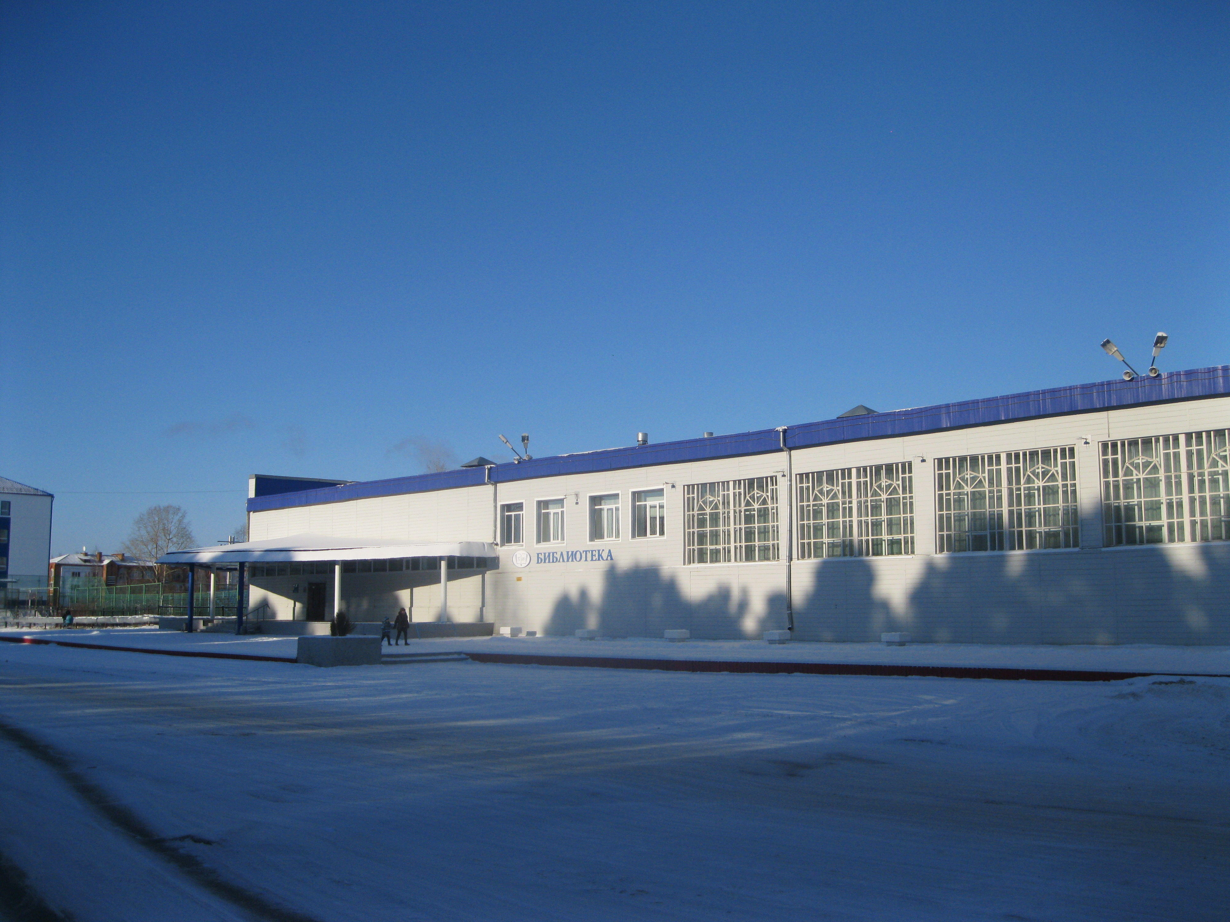 Библиотека в Стрежевом